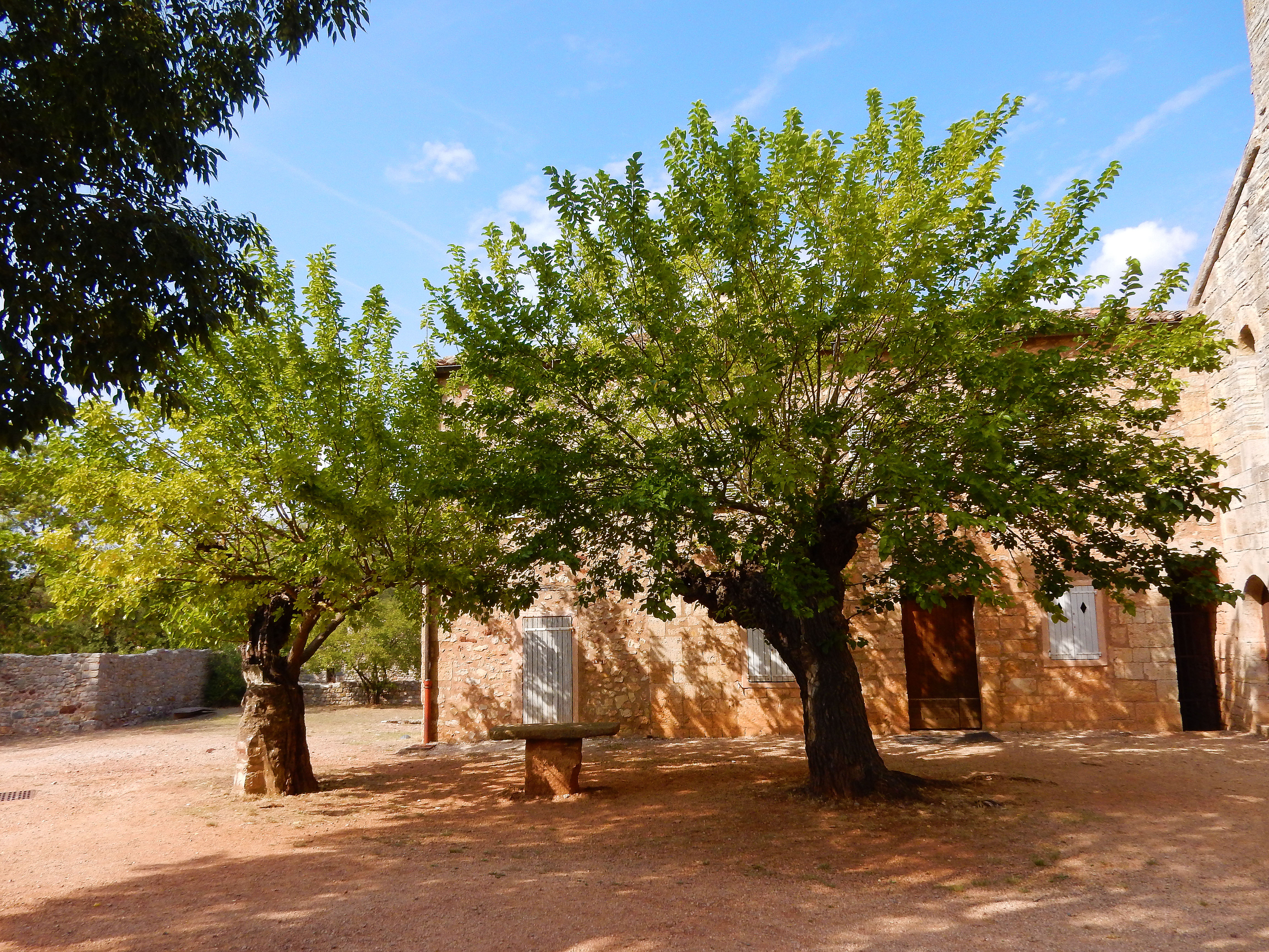 L'abbaye du Thoronet est une abbaye cistercienne.